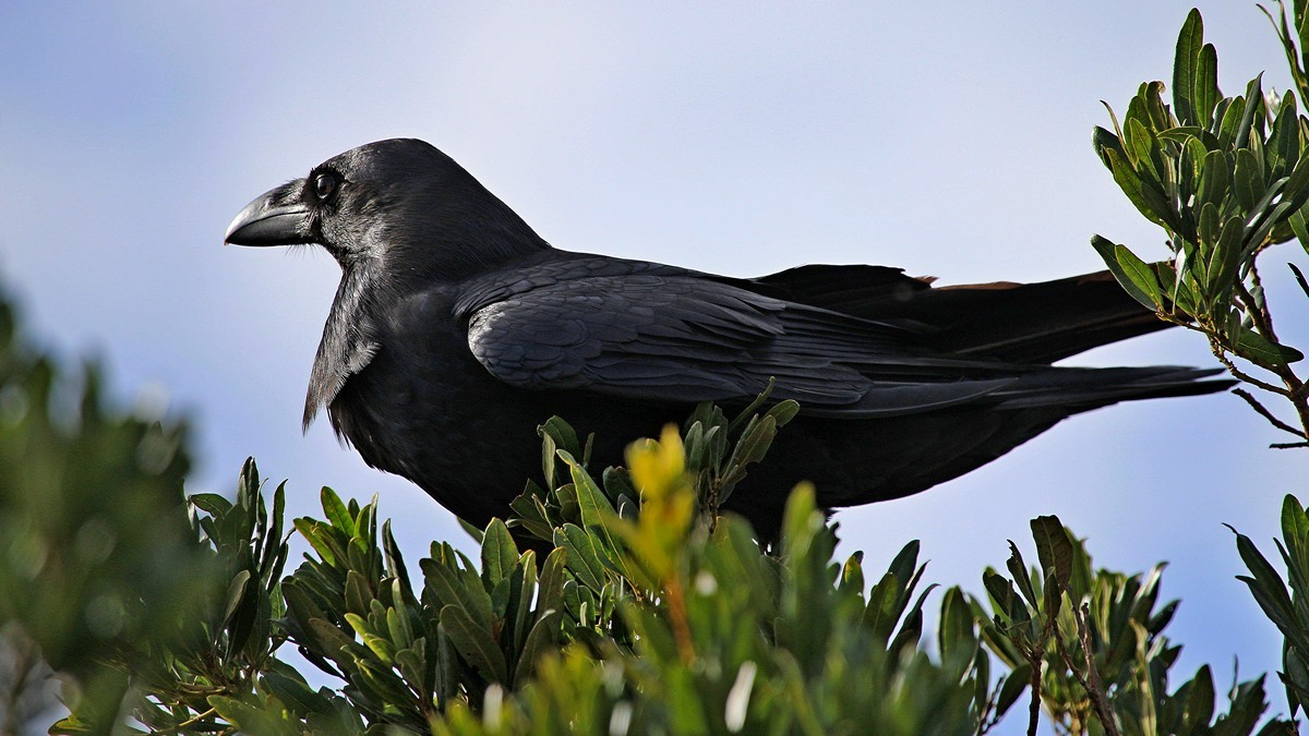 Kanarische Rabenkrähe (Corvus corax tinginatus)